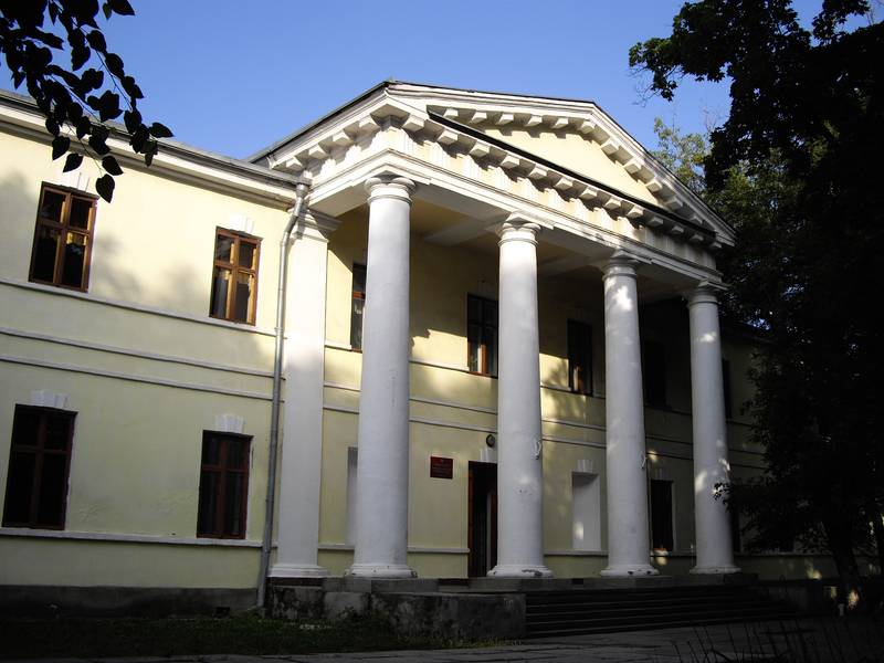 Бывший дом Таранова-Белозерова —Симферополь, ул. К. Маркса, 28/10 («странноприимный дом для одиноких и больных воинов», ныне медицинское училище им. Д. И. Ульянова). Построен в 1826 г. Памятник архитектуры.